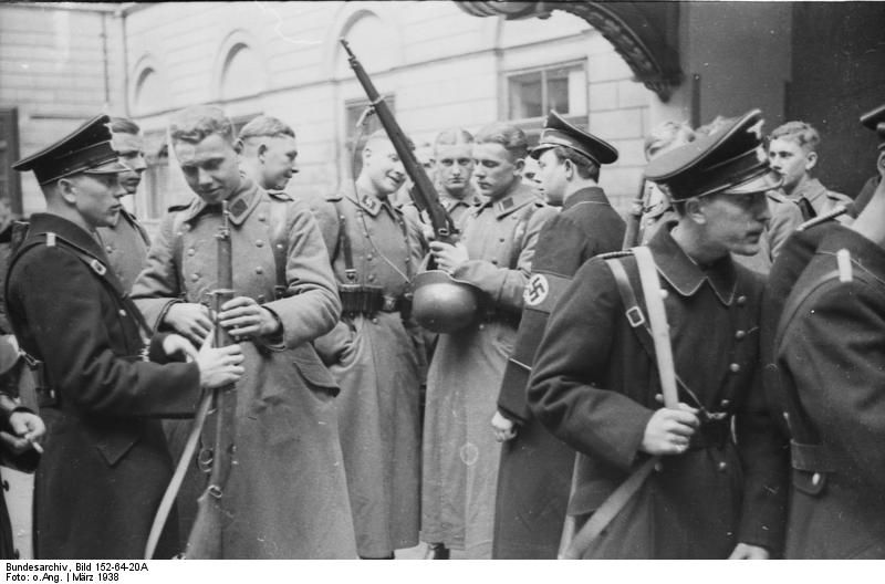 Wien, SS-Razzia bei jüdischer Gemeinde Österreich, Wien.- Razzia der SS in der israelitischen Gemeinde (Gemeindehaus)